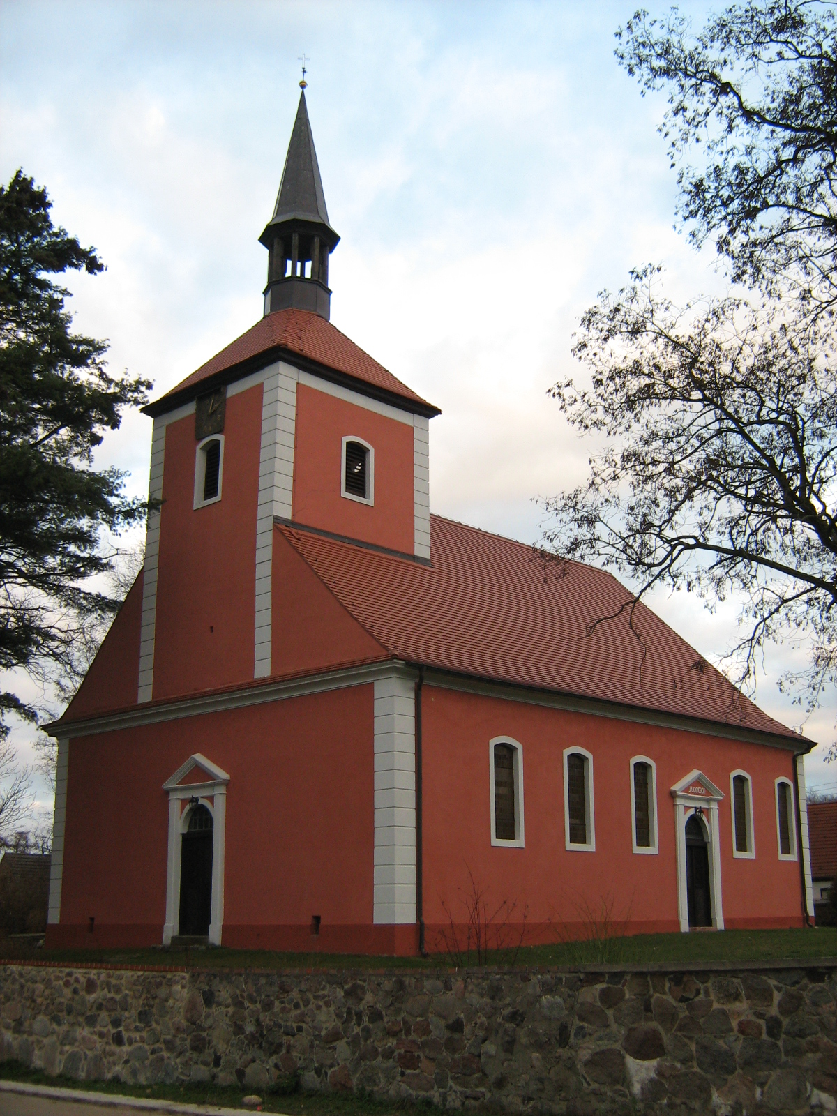 Kirche von Krügersdorf (erbaut 1720), Beeskow, Brandenburg